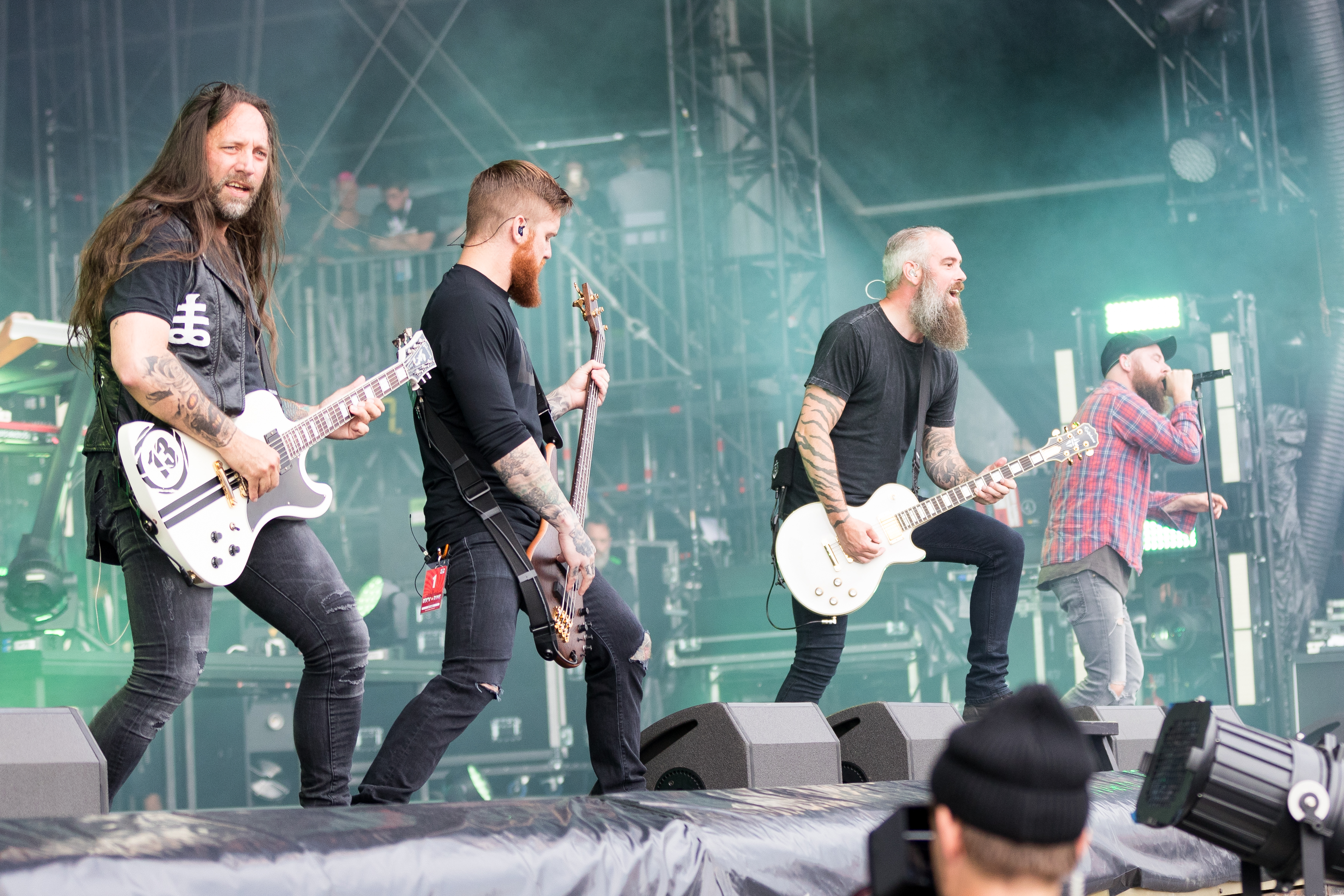 In Flames during Rock am Ring at Nürburgring, Nürnburg, Rheinland Pfalz, Germany on 2017-06-02, Photo: Sven Mandel